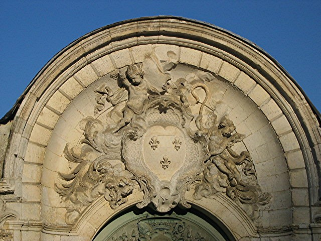 Abbaye de Saint-Wandrille, Seine-Maritime, Haute-Normandie / Photographie personnelle prise par Urban, décembre 2004/ GFDL Urban